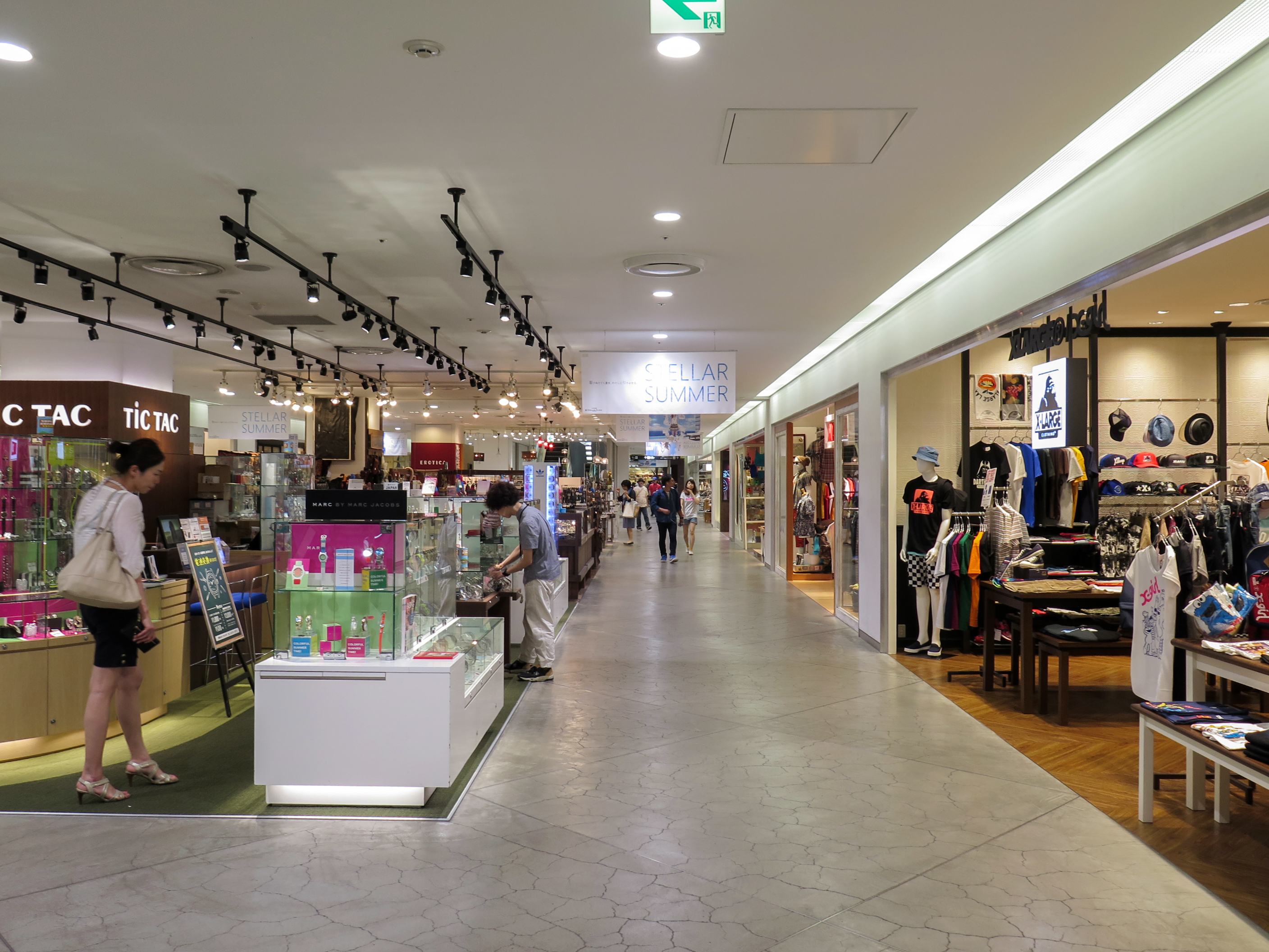 Stellar Place Sapporo Level 5